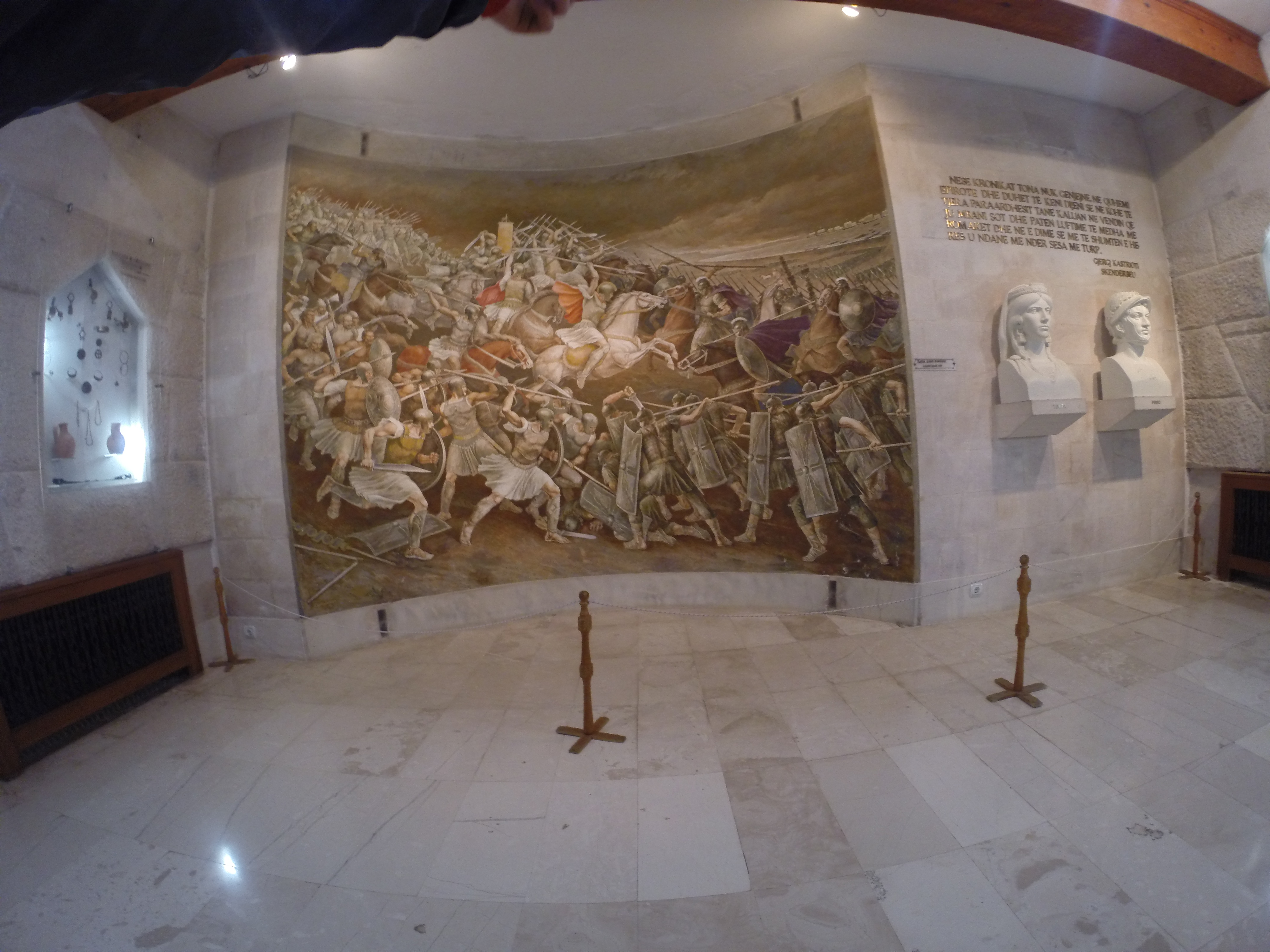 Kalaja e Krujes